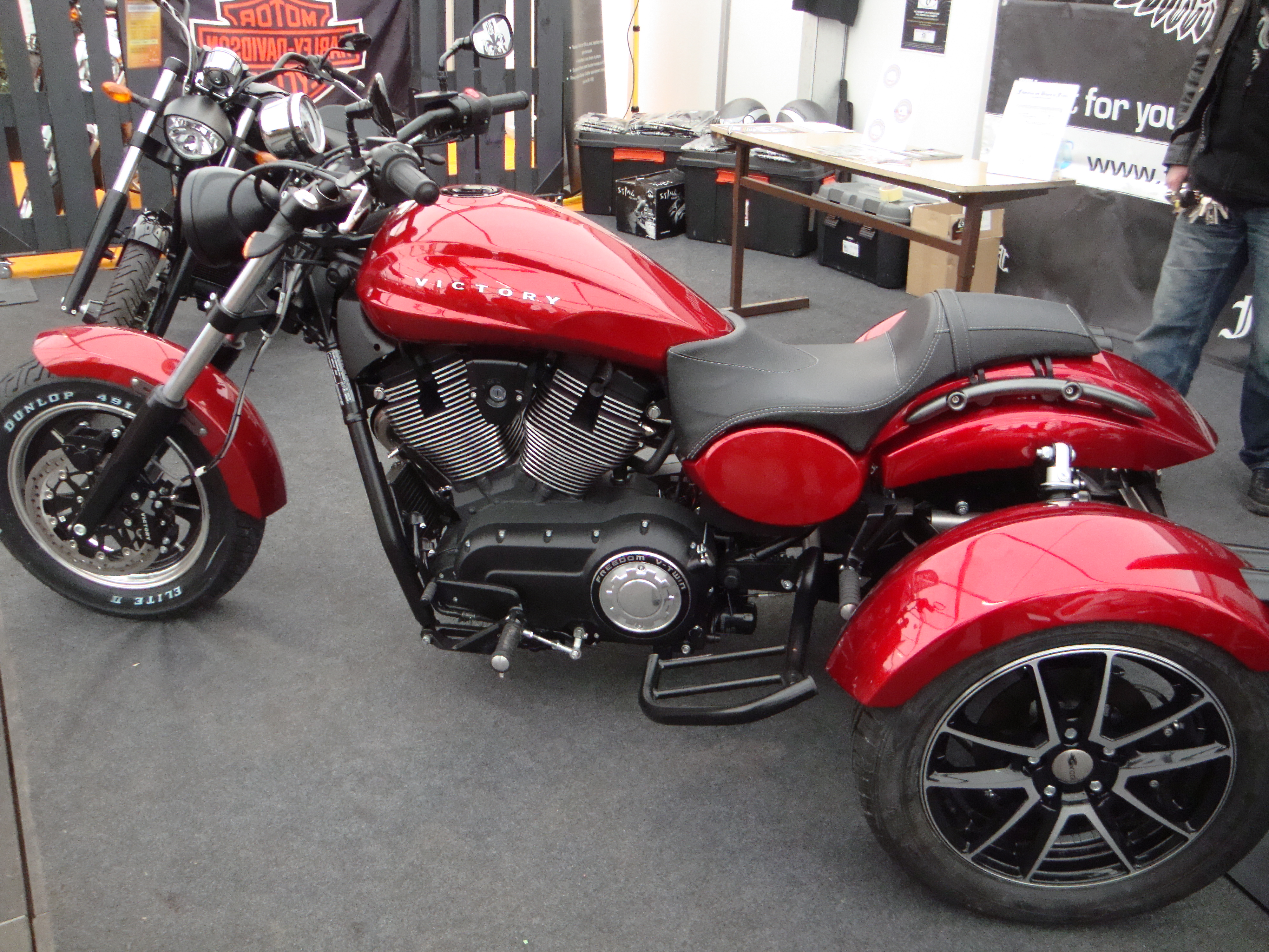 Photo réalisée avec Thierry Devemy au salon de Pecquencourt en mars 2013 lors de la présentation d'une Victory Judge transformée en trike par EML France